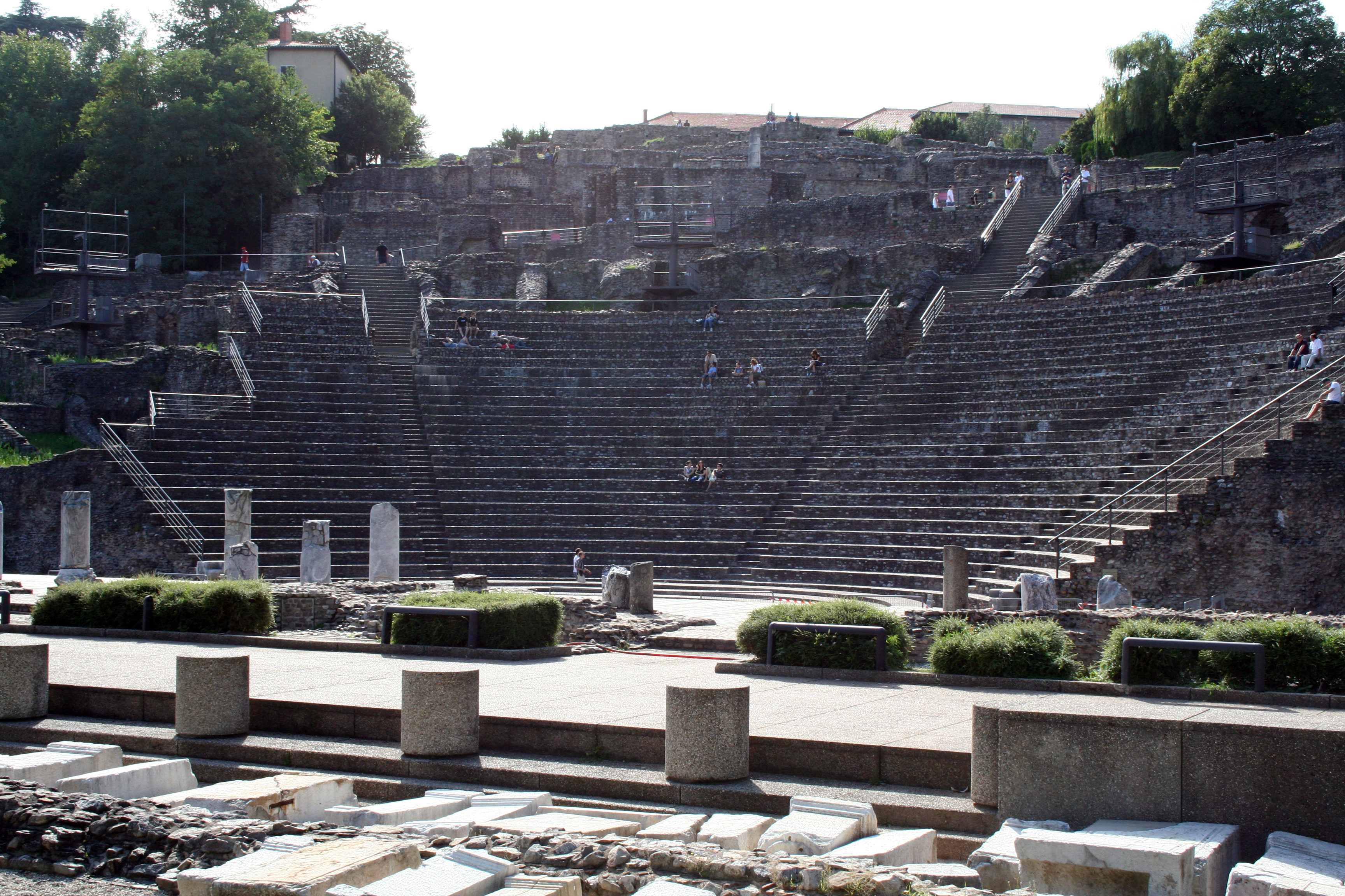 Théâtre romain